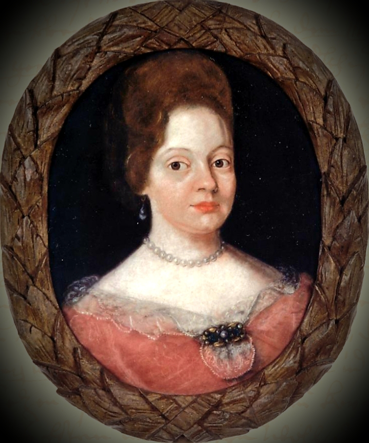 Pastellbildnis der Catharina Regina von Greiffenberg, 50x40 cm, 1986 in Schloß Seisenegg aufgefunden von Dr. Heimo Cerny. Bundesdenkmalamt Wien, Nr. W 7563